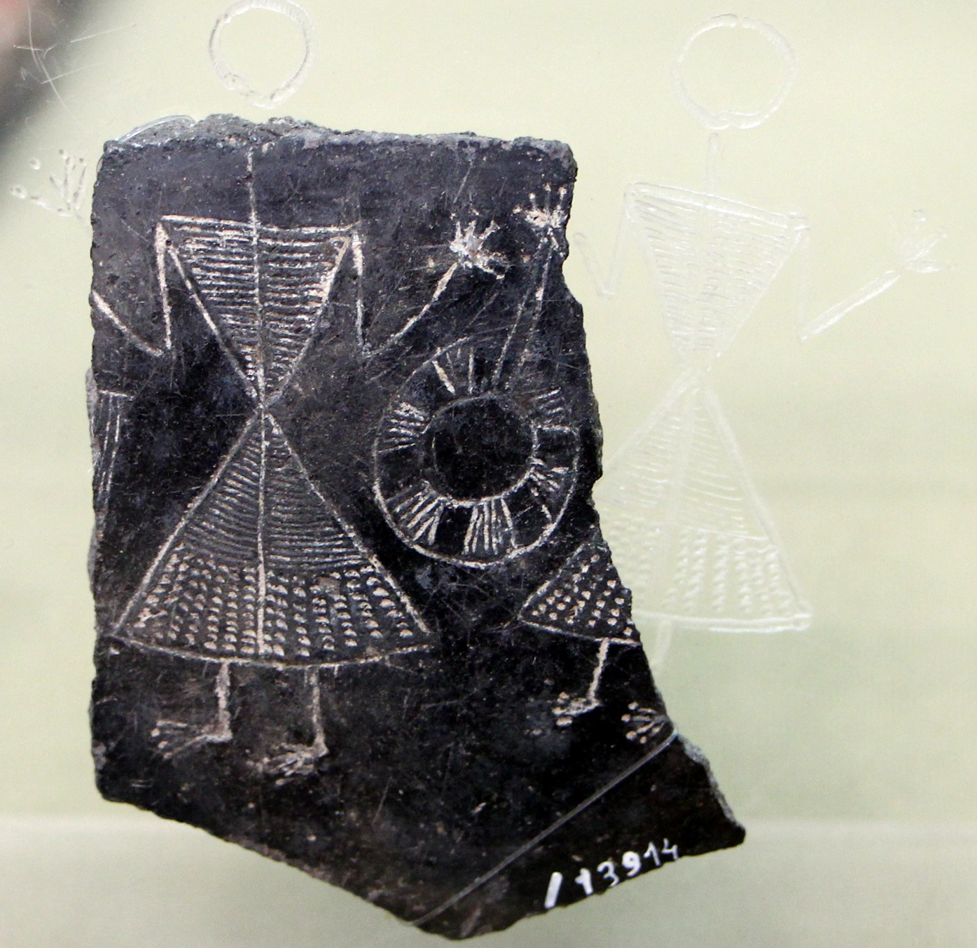 Museo archeologico nazionale G.A. Sanna - MIBAC The making of this document was supported by Wikimedia CH. (Submit your project!) For all the files concerned, please see the category Supported by Wikimedia CH. This is a photo of a monument which is part of cultural heritage of Italy.